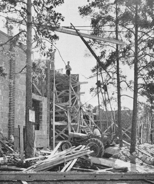 Radhusen på Riksrådsvägen i Stockholm under byggnation.